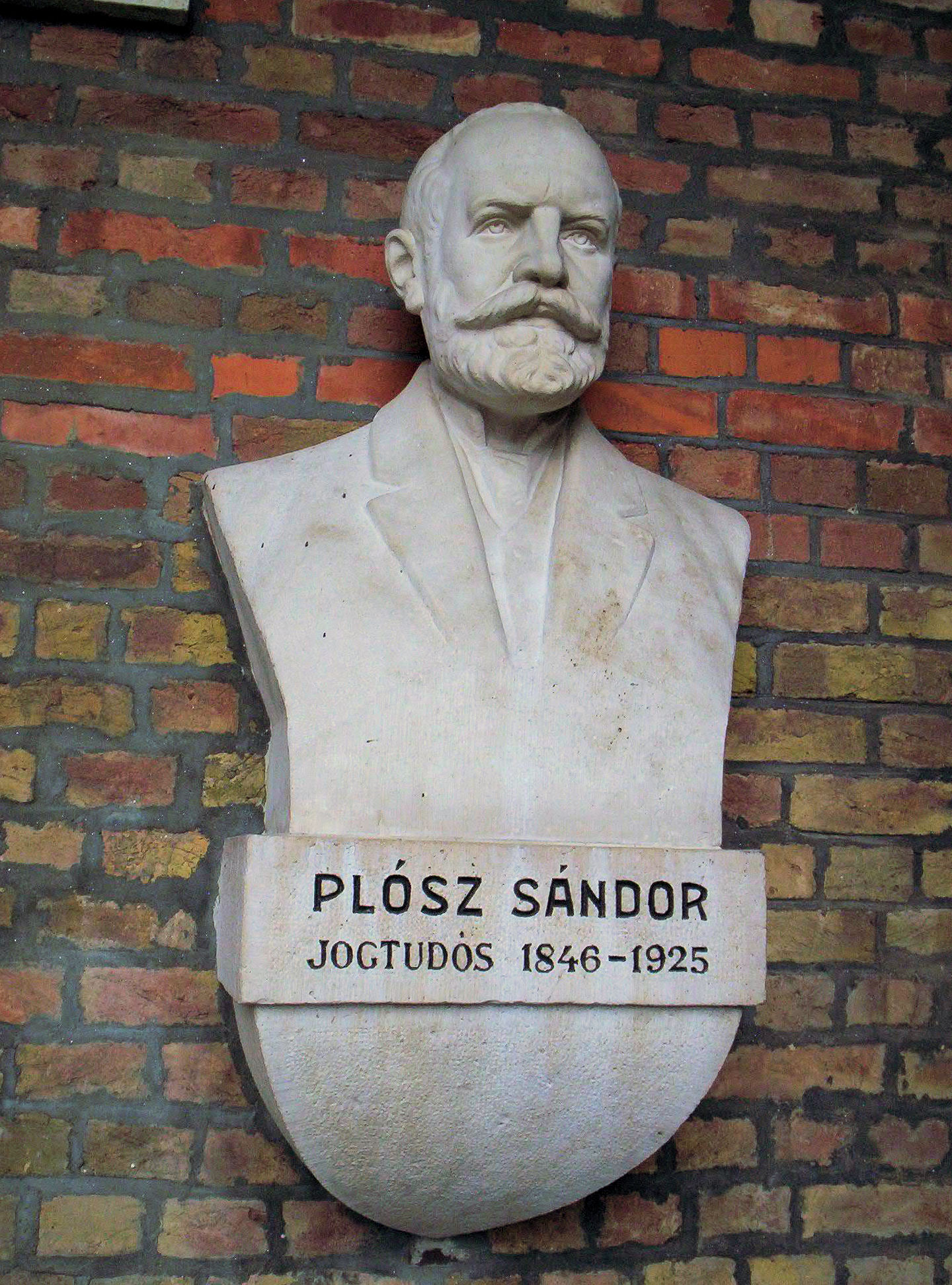 Plósz Sándor jogász, egyetemi tanár, igazságügyminiszter szobra Szegeden. Papp József alkotása – photo taken by uploader User:Csanády